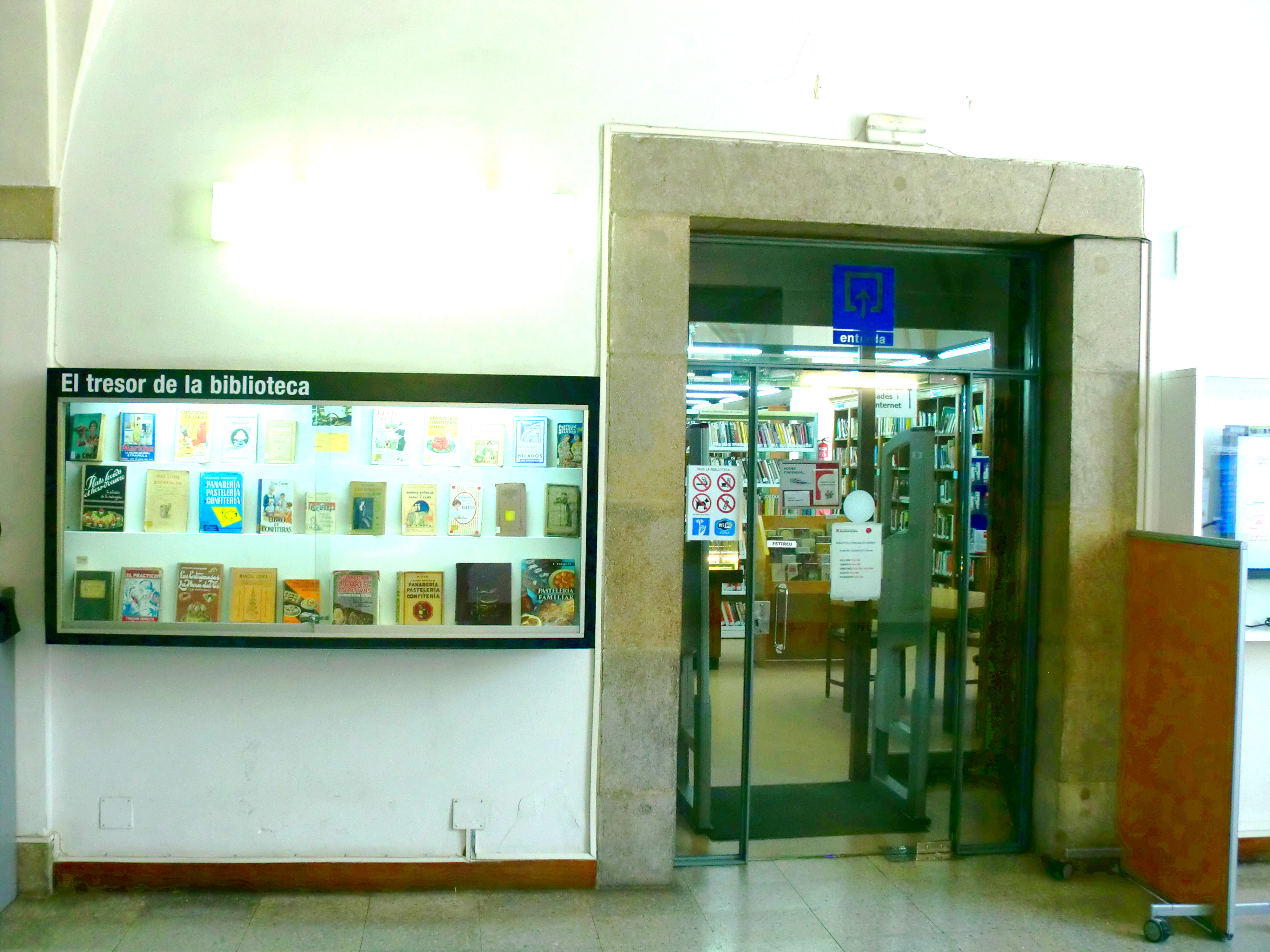 Porta d'entrada a la Biblioteca Pública de Girona, al vestíbul de la Casa de Cultura de Girona